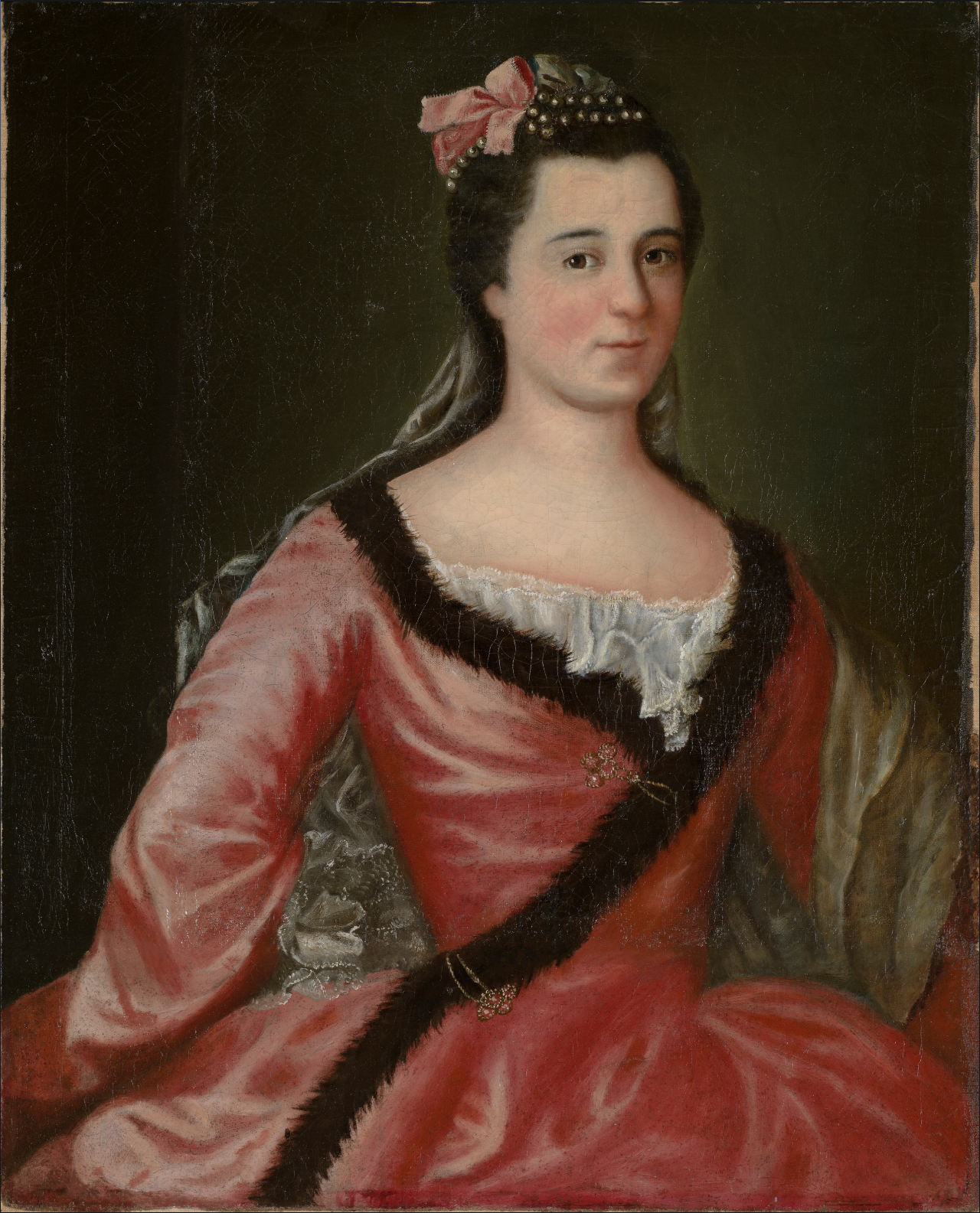 Madame Gaspard-Joseph Chaussegros de Léry, fils, née Louise Martel de Brouage Note : On a déjà cru qu'il s'agissait du portrait de Marie-Renée (Legardeur de Beauvais) Chaussegros de Léry. Le format du tableau a été augmenté pour s'harmoniser avec celui de Gaspard-Joseph Chaussegros de Léry, fils